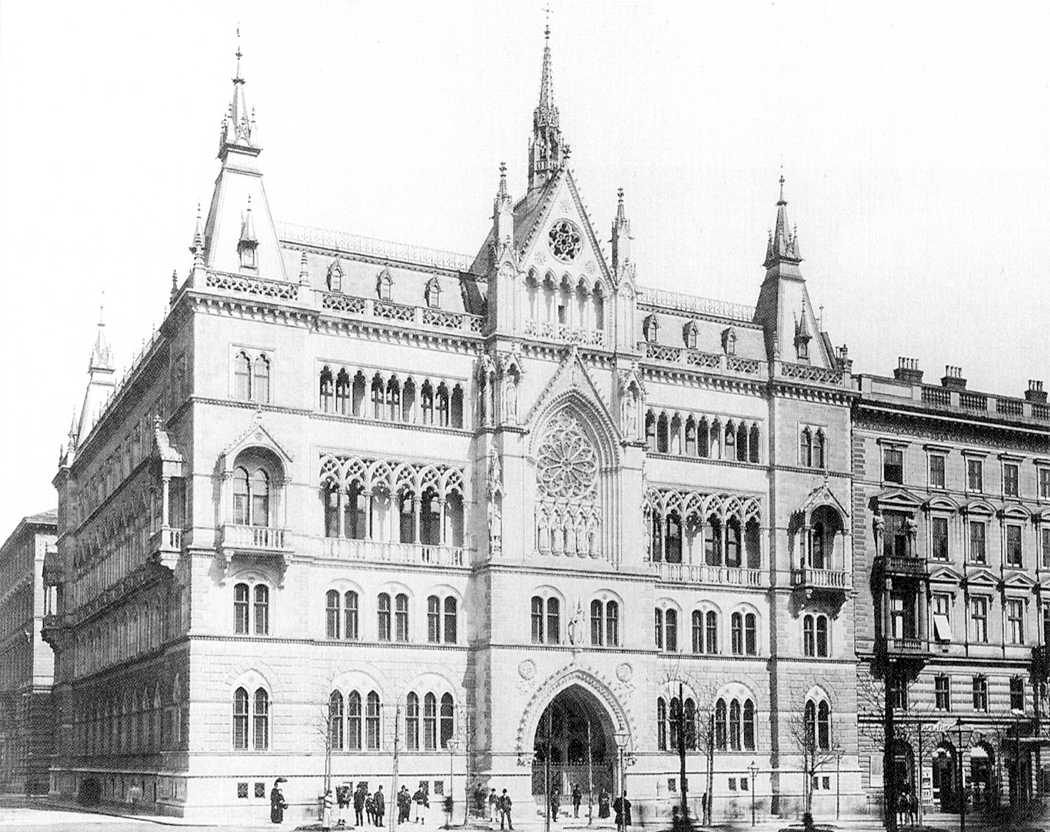 Das Sühnhaus am Schottenring 7 an der Wiener Ringstraße